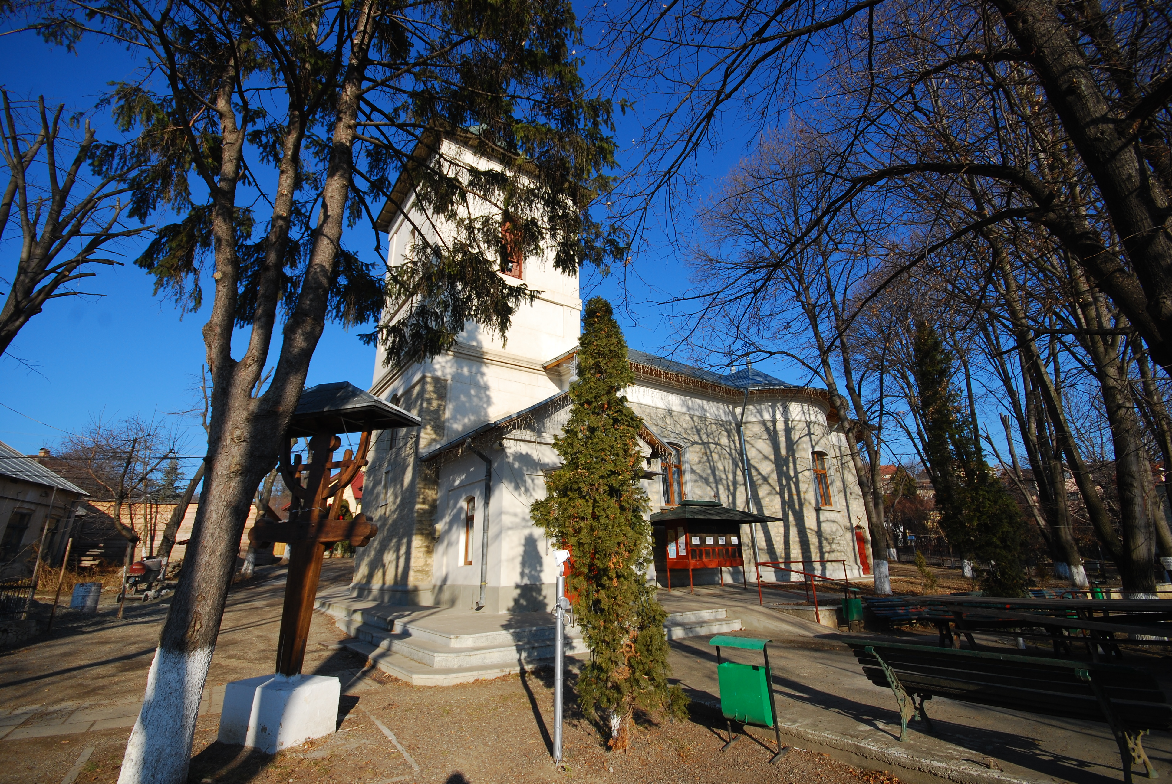 Biserica "Sf. Apostol Toma și Sf. Ecaterina" 01